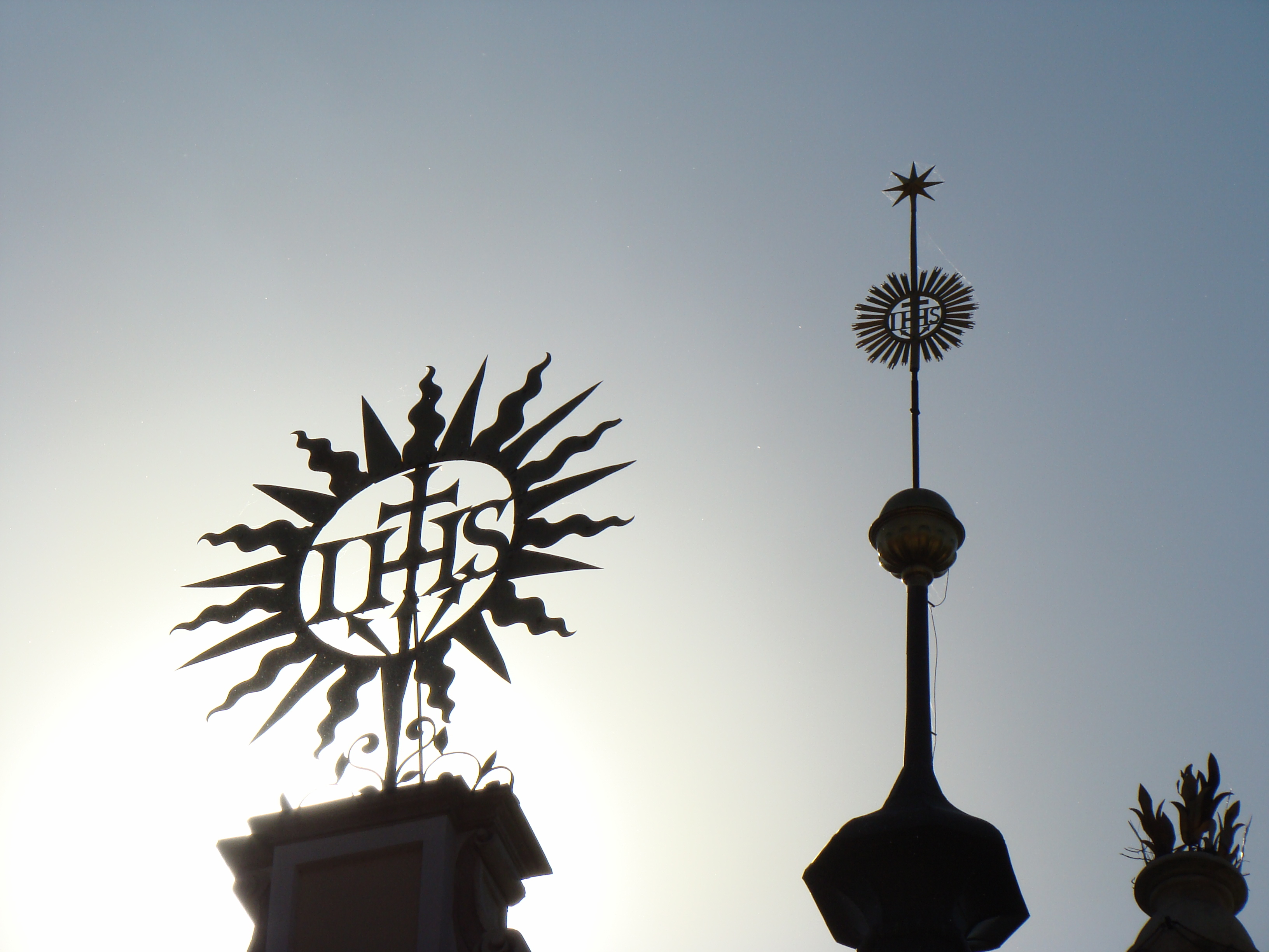 Sygnaturki na kościele Imienia Jezus we Wrocławiu